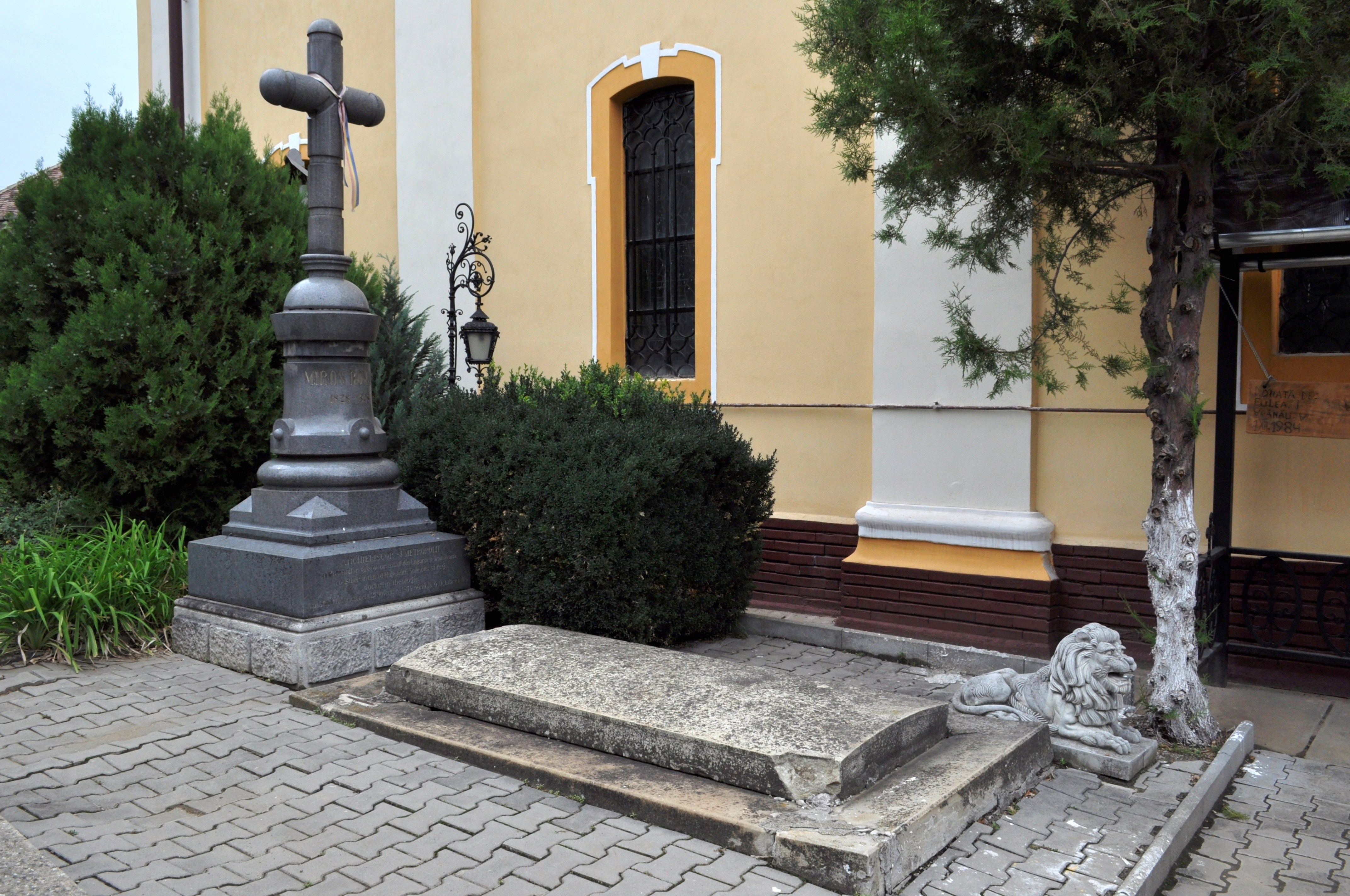 Cimitirul bisericii "Buna Vestire" - "din Groapă" (Sibiu, str.justiției, nr.5) - Mormântul mitropolitului Miron Romanul 03